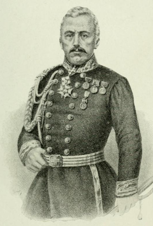 Il Luogotenente generale Filiberto Mollard, comandante la 3a divisione Sarda, distintosi a San Martino il 24 giugno 1859